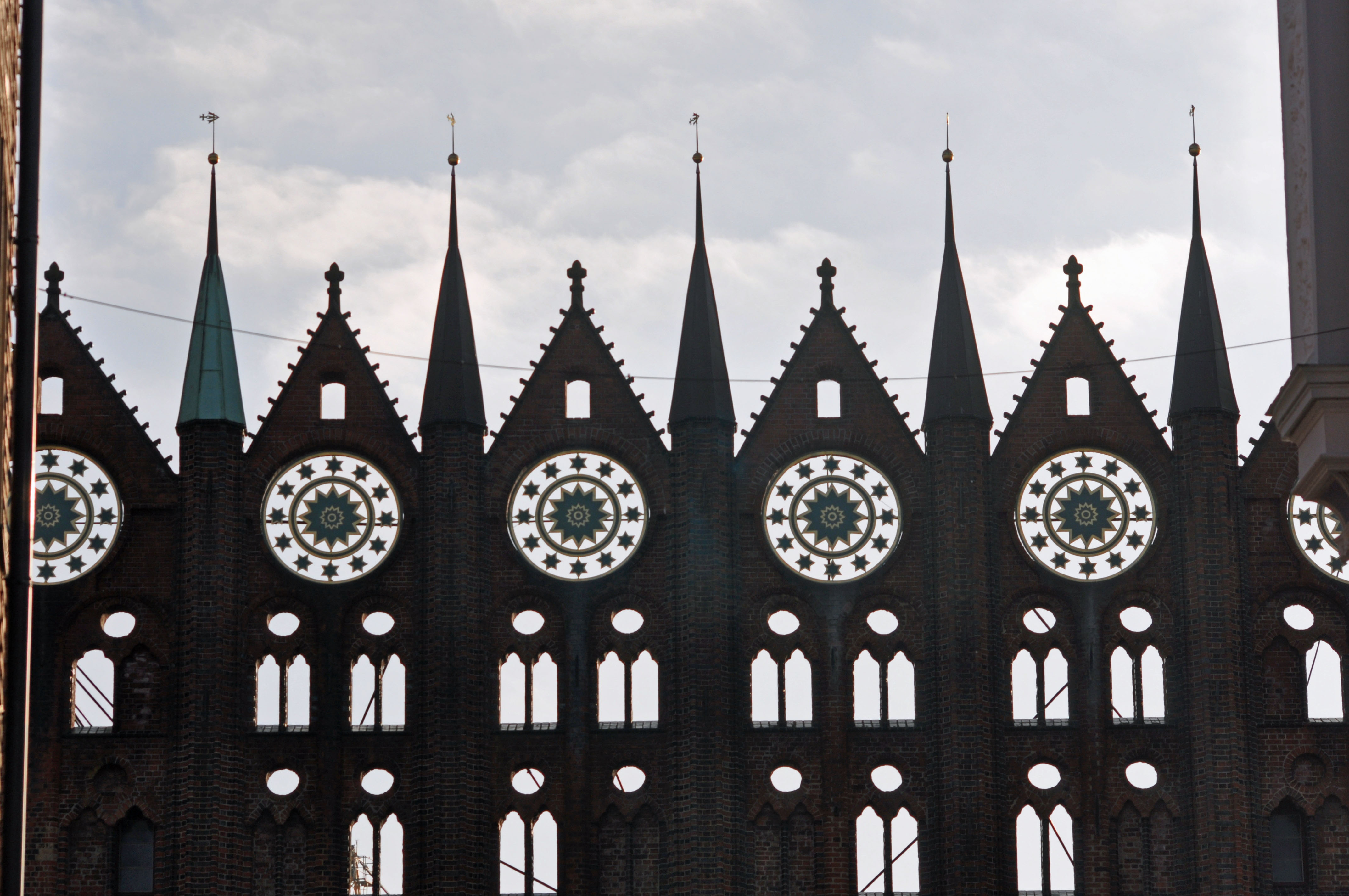 Stralsund, Rathaus, 02 (2012-01-26) by Klugschnacker in Wikipedia Der Giebel am Rathaus Stralsund. Blick aus der Knieperstraße.